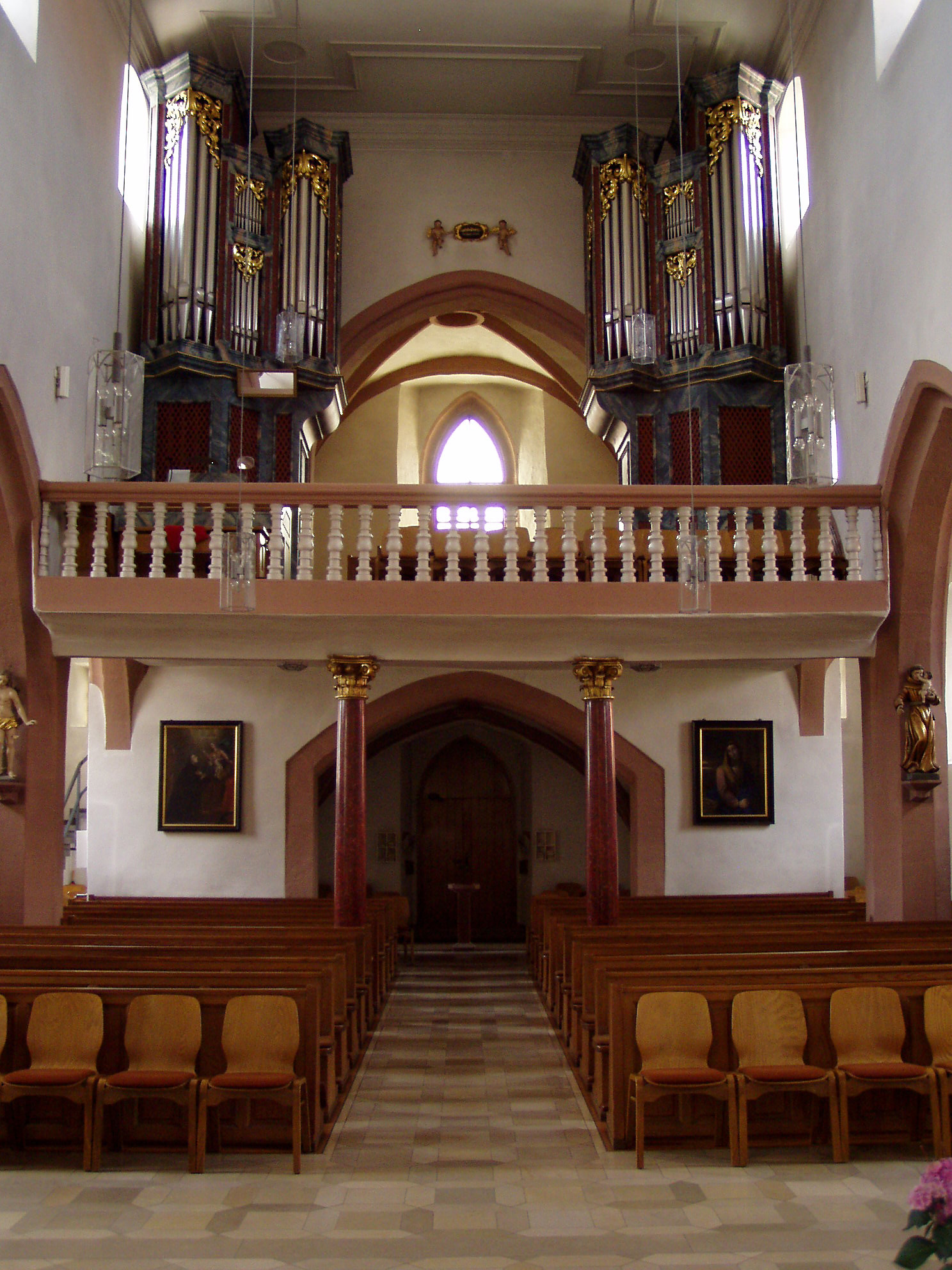 Geteilter Orgelprospekt auf der Orgelempore der Pfarrkirche St.Johannes in Schlüsselfeld / Oberfranken